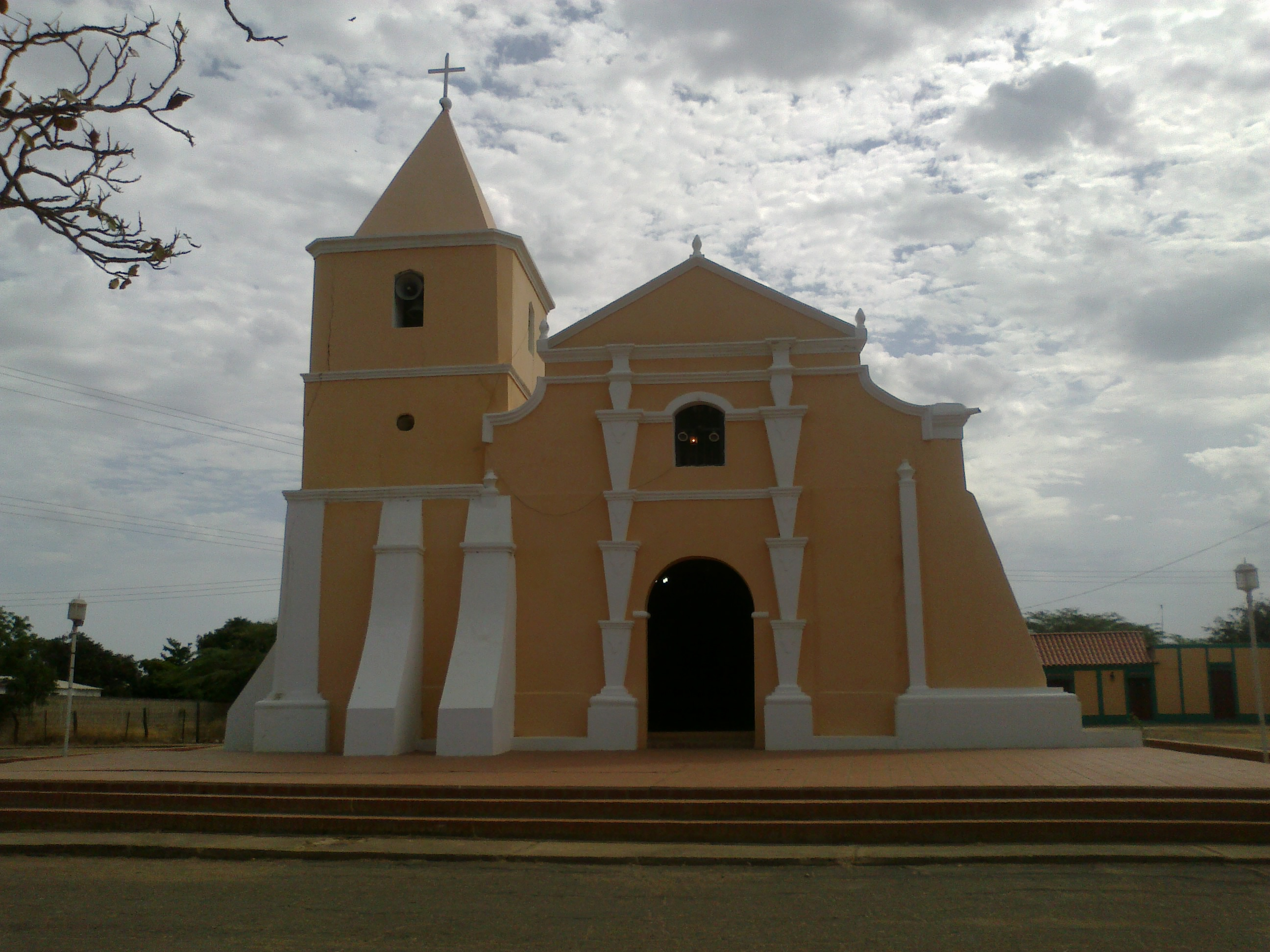 Iglesia "Nuestra Señora de Las Mercedes" en Borojó, estado Falcón. Venezuela